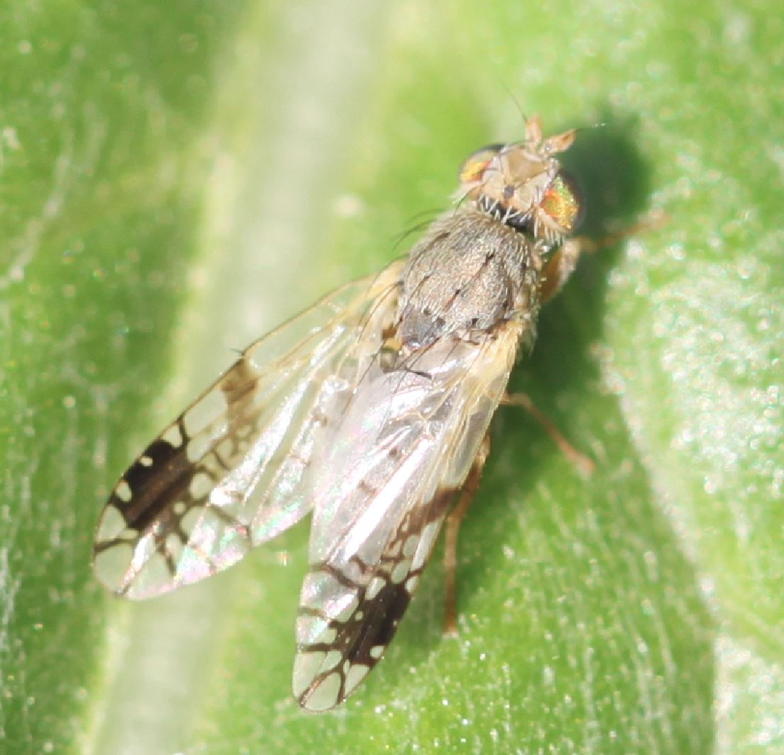 Bohrfliege Tephritis cometa am 13. Mai 2019 in Walldorf/Baden